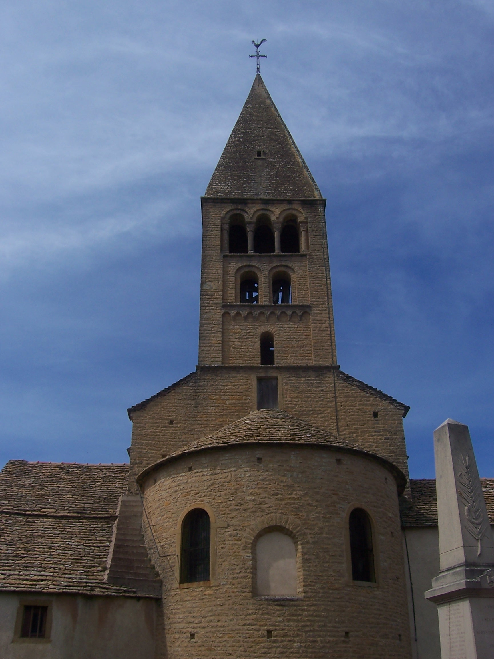 Eglise de la Vineuse